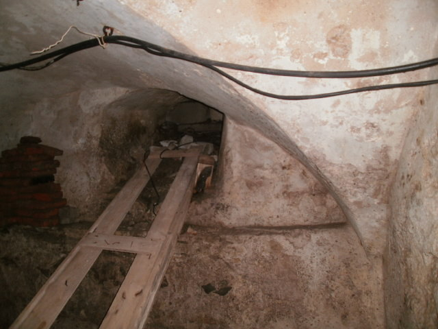 II keldrikorrusel asuva põhjapoolse ristvõlviga ruumi loodenurk koos aknaavaga.